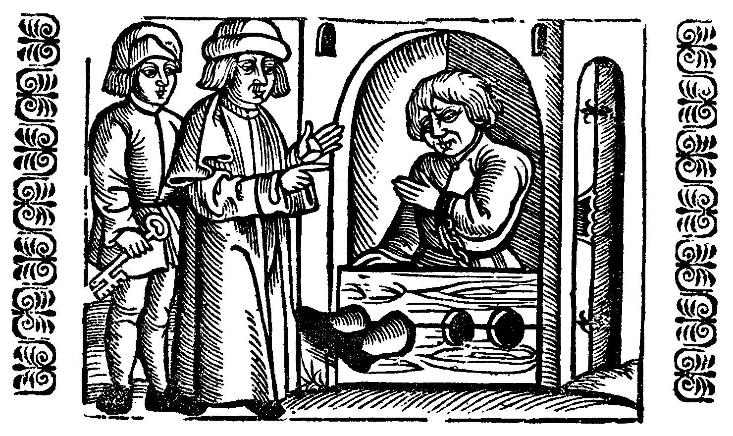 ilustracje z książki Biernata z Lublina Ezop (Ignacy Chrzanowski) wydanie krytyczne (wg edycji z r. 1578), Kraków 1910 Akademia Umiejętności w Krakowie